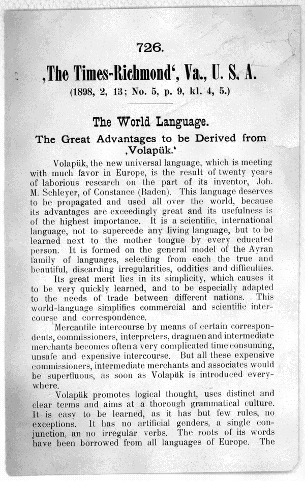 1898 advertising broadsheet for Volapük.